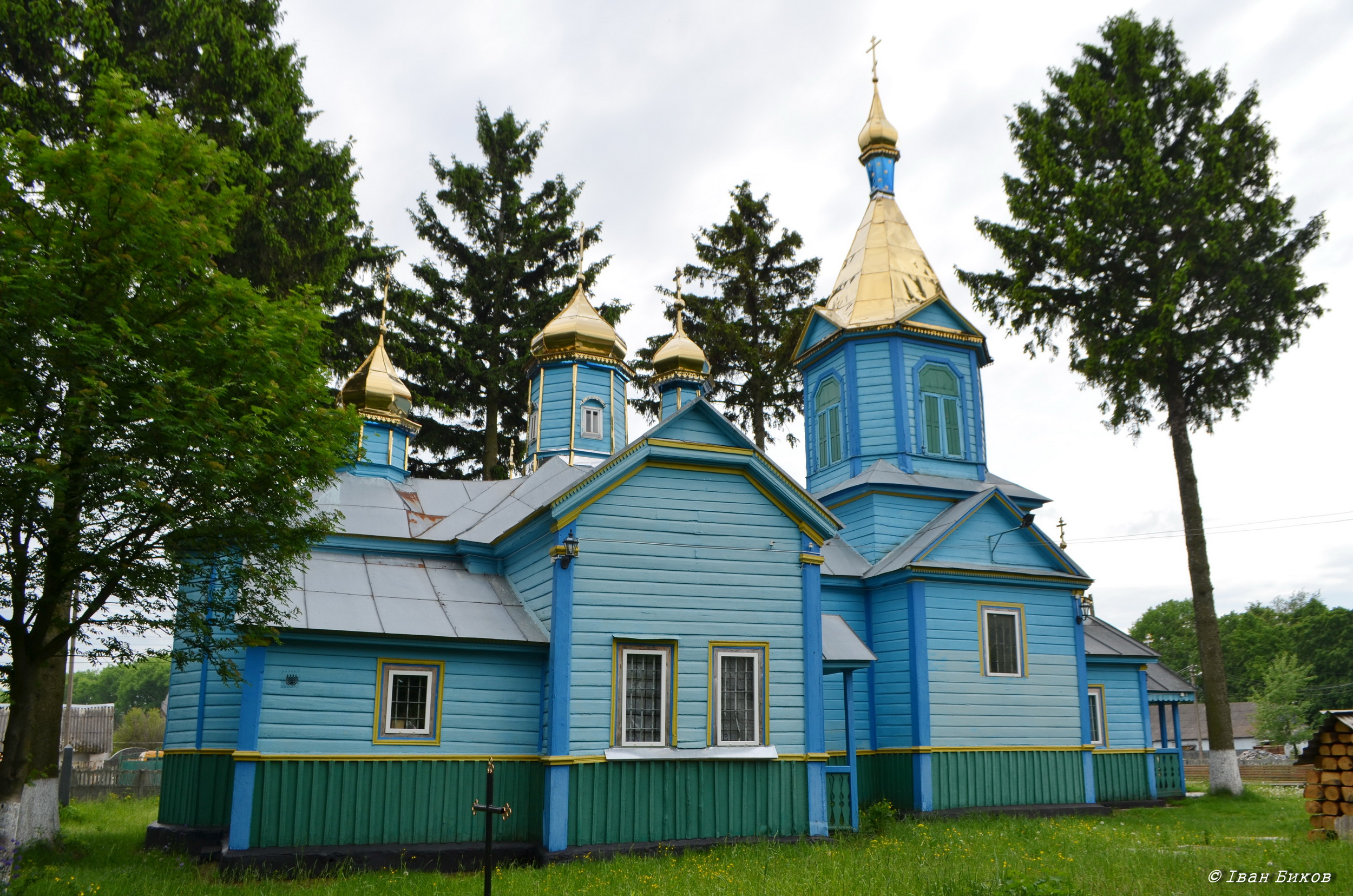 Михайлівська церква, с. Гадзинка, вул. Шевченка, 3